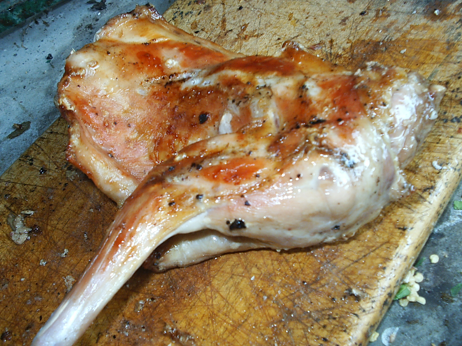 Conejo ahumado para la elaboración posterior de los pasteles o tamales